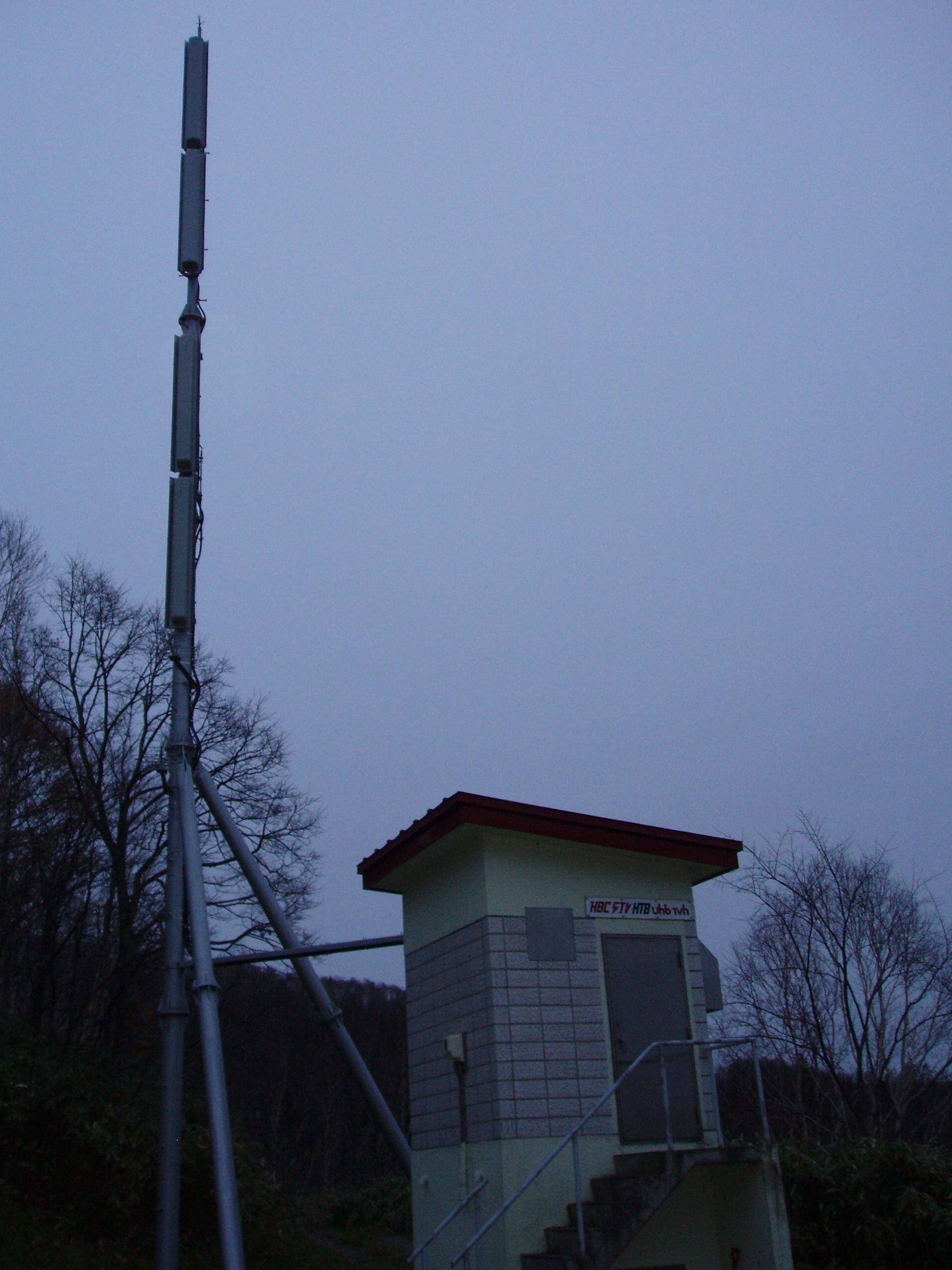 幌加内中継局（民放 アナログ・デジタル併設）